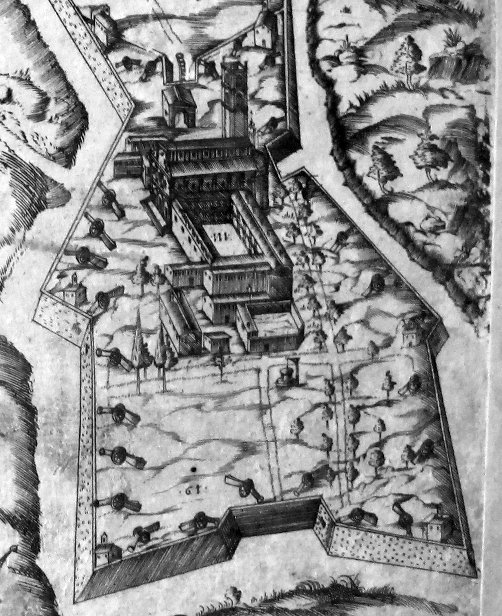 Pianta del buonsignori, dettaglio 111 san miniato